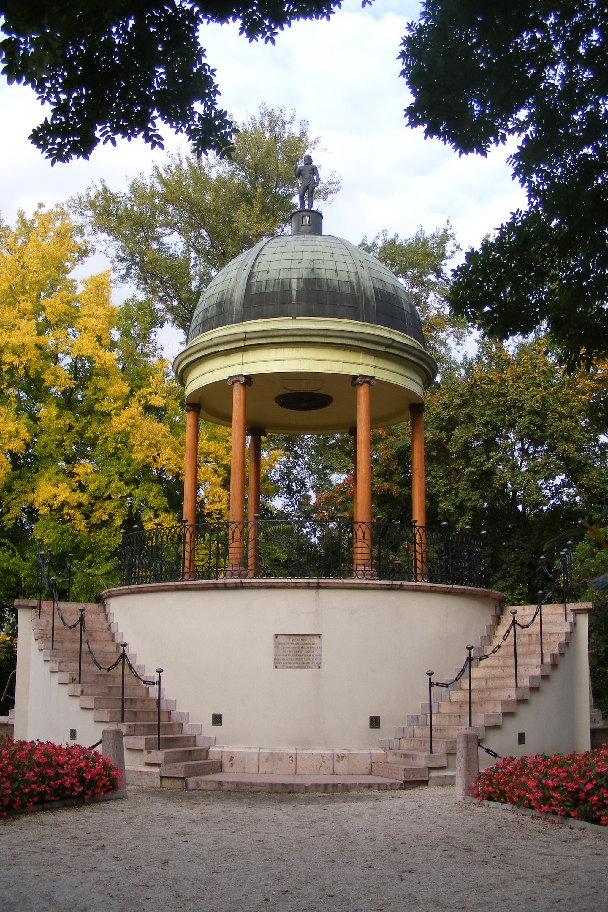 Margit-sziget zenélő kút.